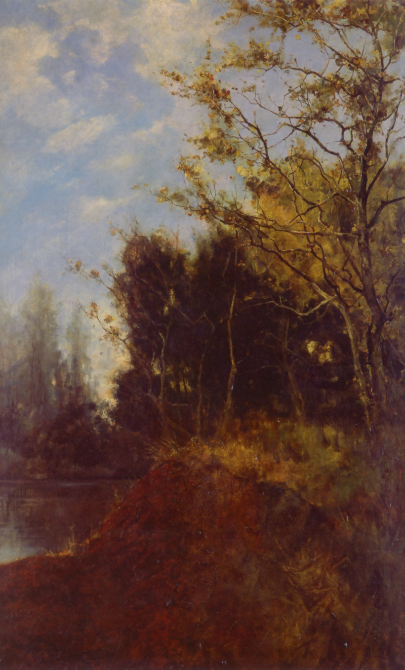 Antonín Chittussi: Tümpel am Waldesrand (um 1883), Öl auf Leinwand, 103 × 64 cm (Sammlung Kooperativa)